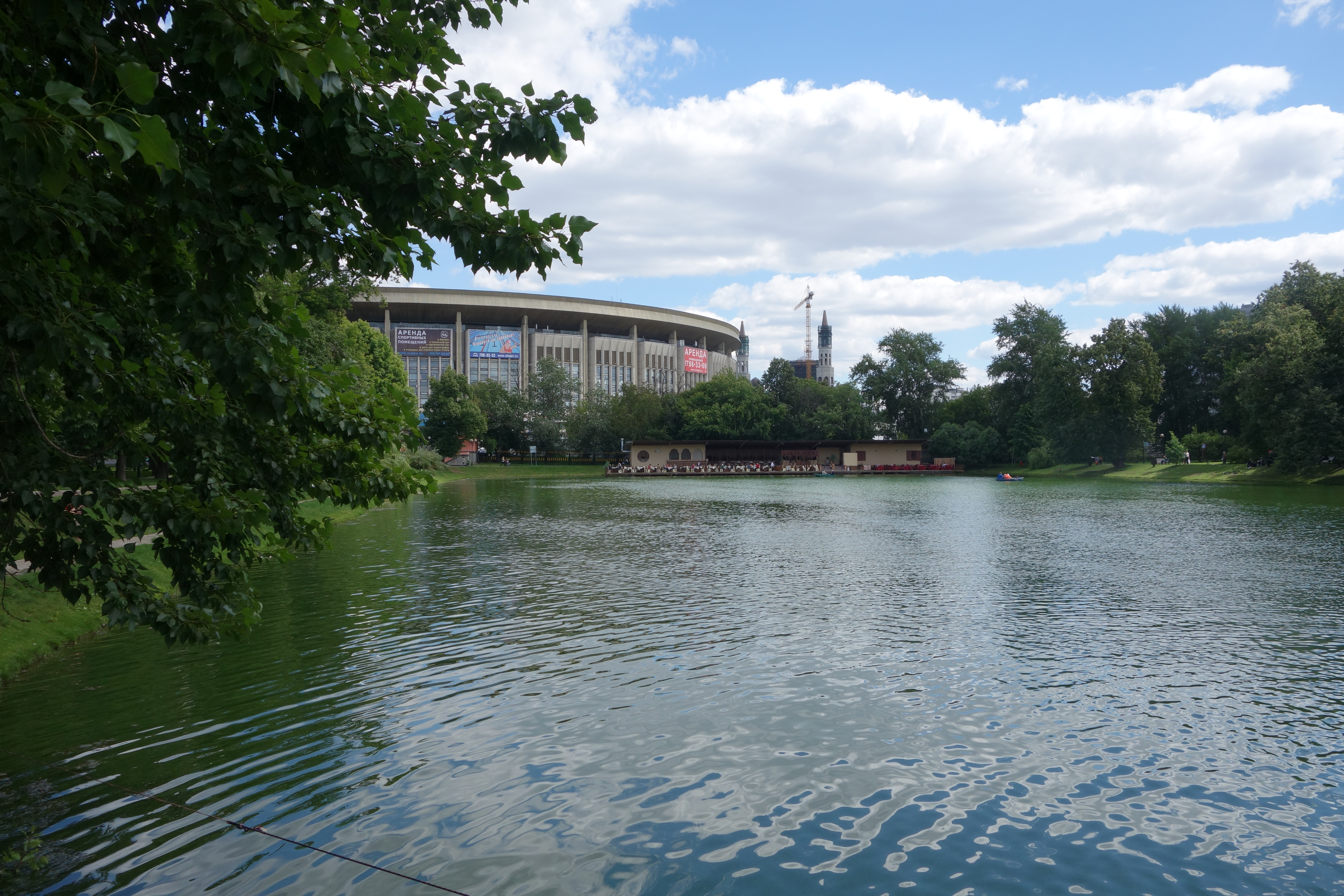 Екатеринский парк. Вид на Олимпийский